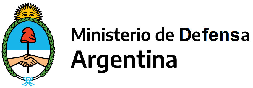 Ministerio de Defensa